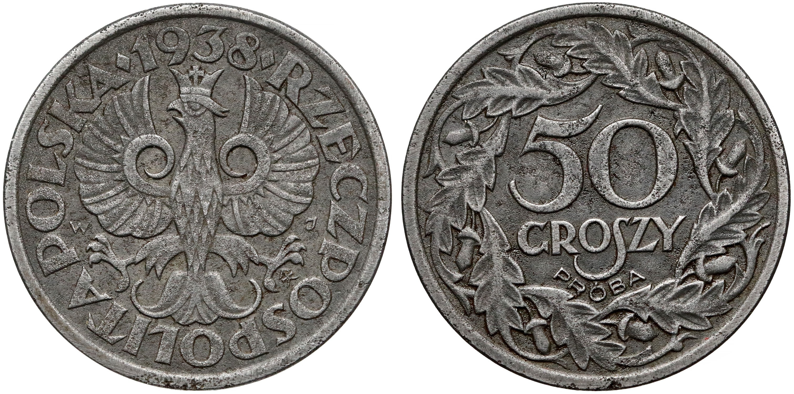 PRÓBA 50 groszy 1938 stary orzeł żelazo